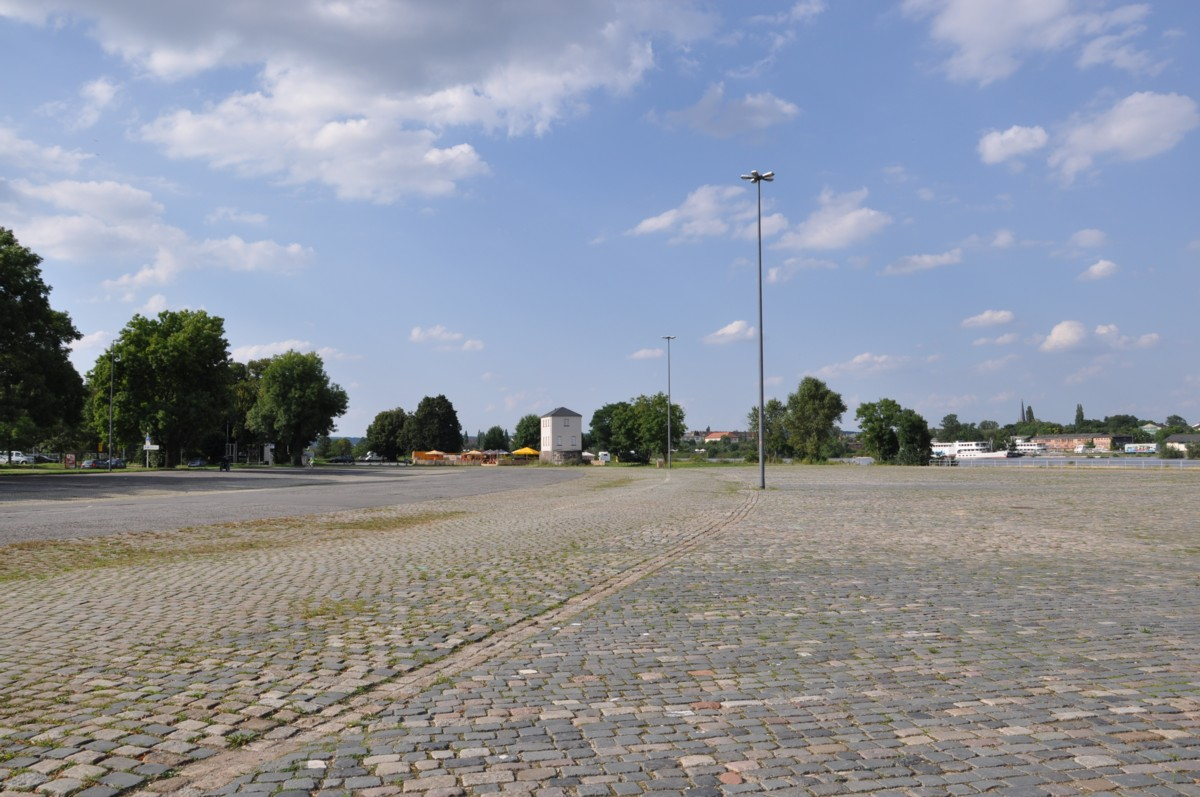 Ehemaliger Bahnhof Dresden-Altstadt Elbufer, heute Busparkplatz und Volksfestgelände